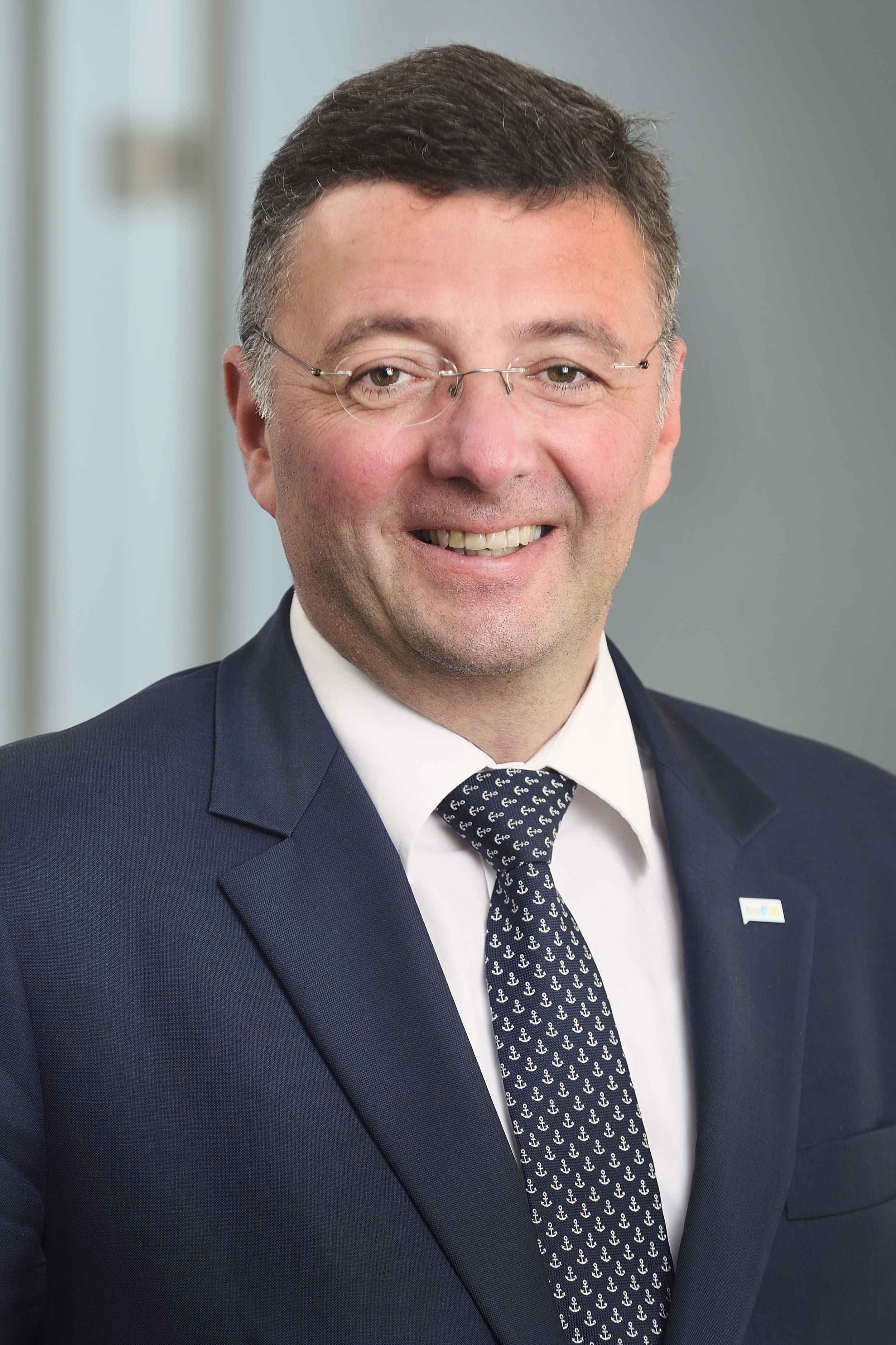 Portrait Jörg Leichtfried, Bundesminister für Verkehr, Innovation und Technologie